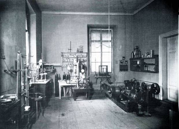 Лаборатория Ольшевского и Врублевского с аппаратом сжижения газов